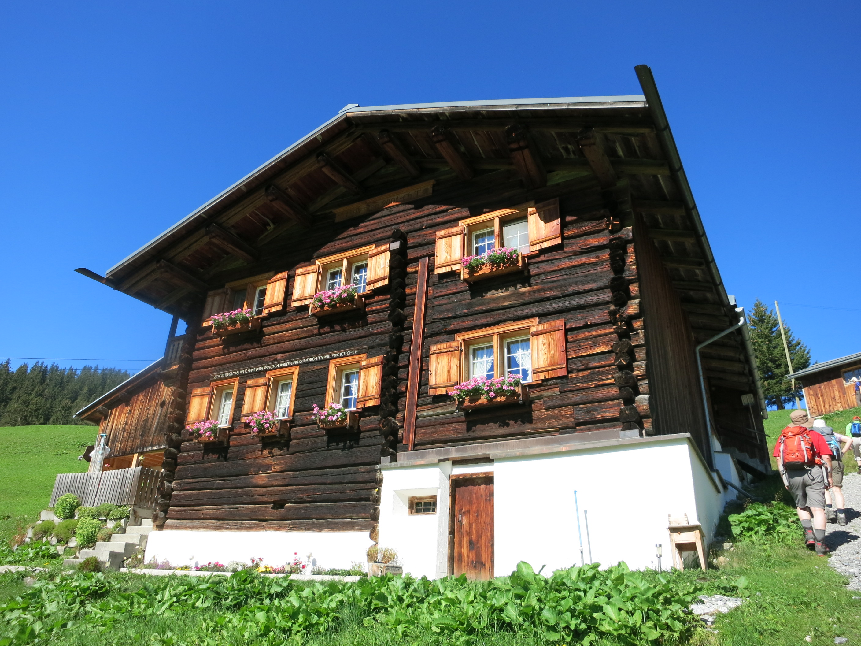 Walserhaus von 1394, St. Antönien GR, Schweiz